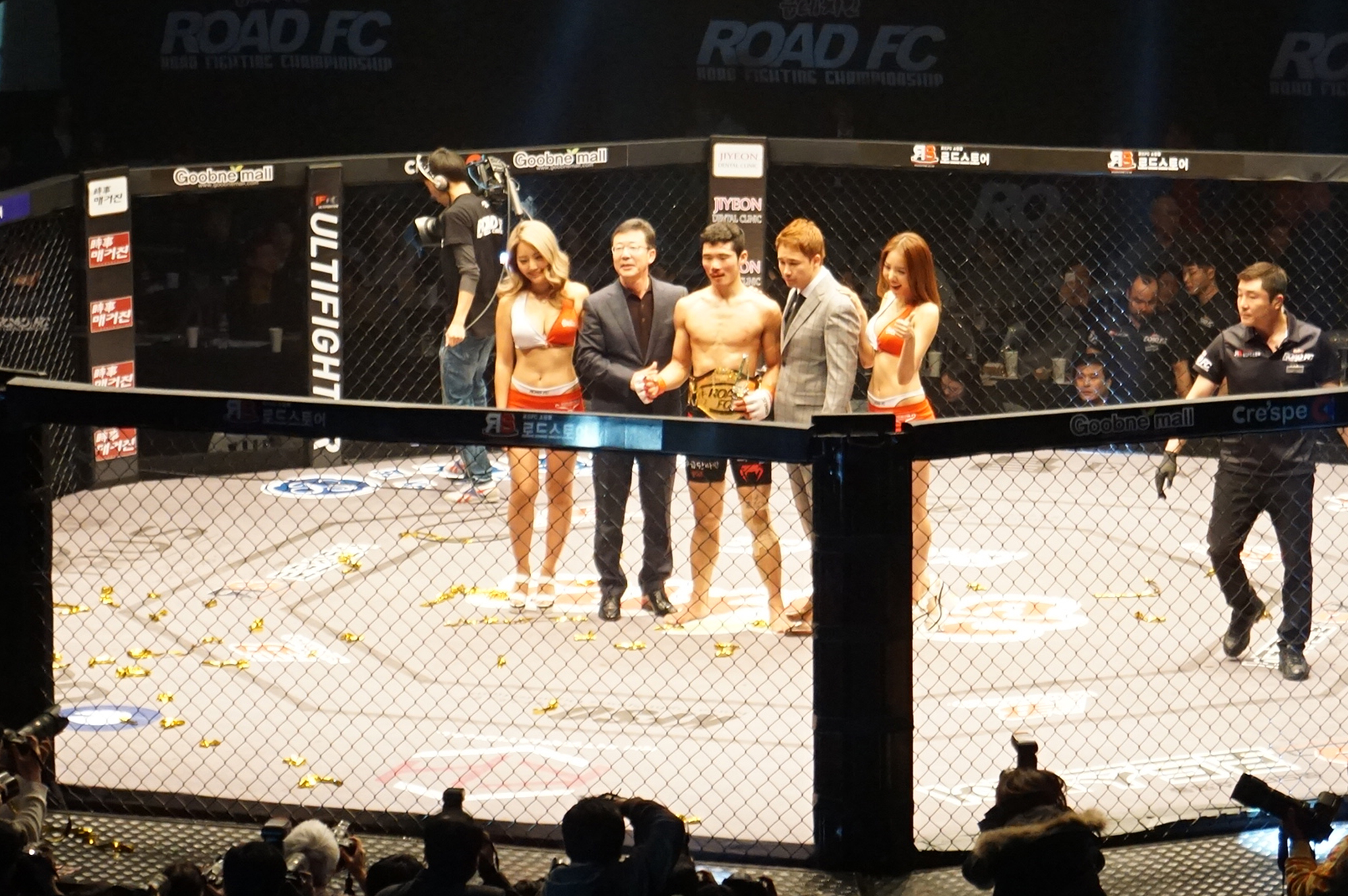 로드 FC 페더급 타이틀 1차 방어전에 성공한 최무겸